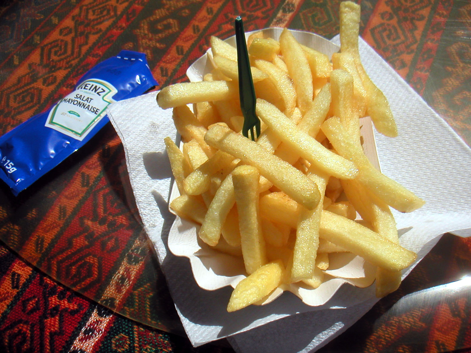 Pommes frites med salatmayonnaise